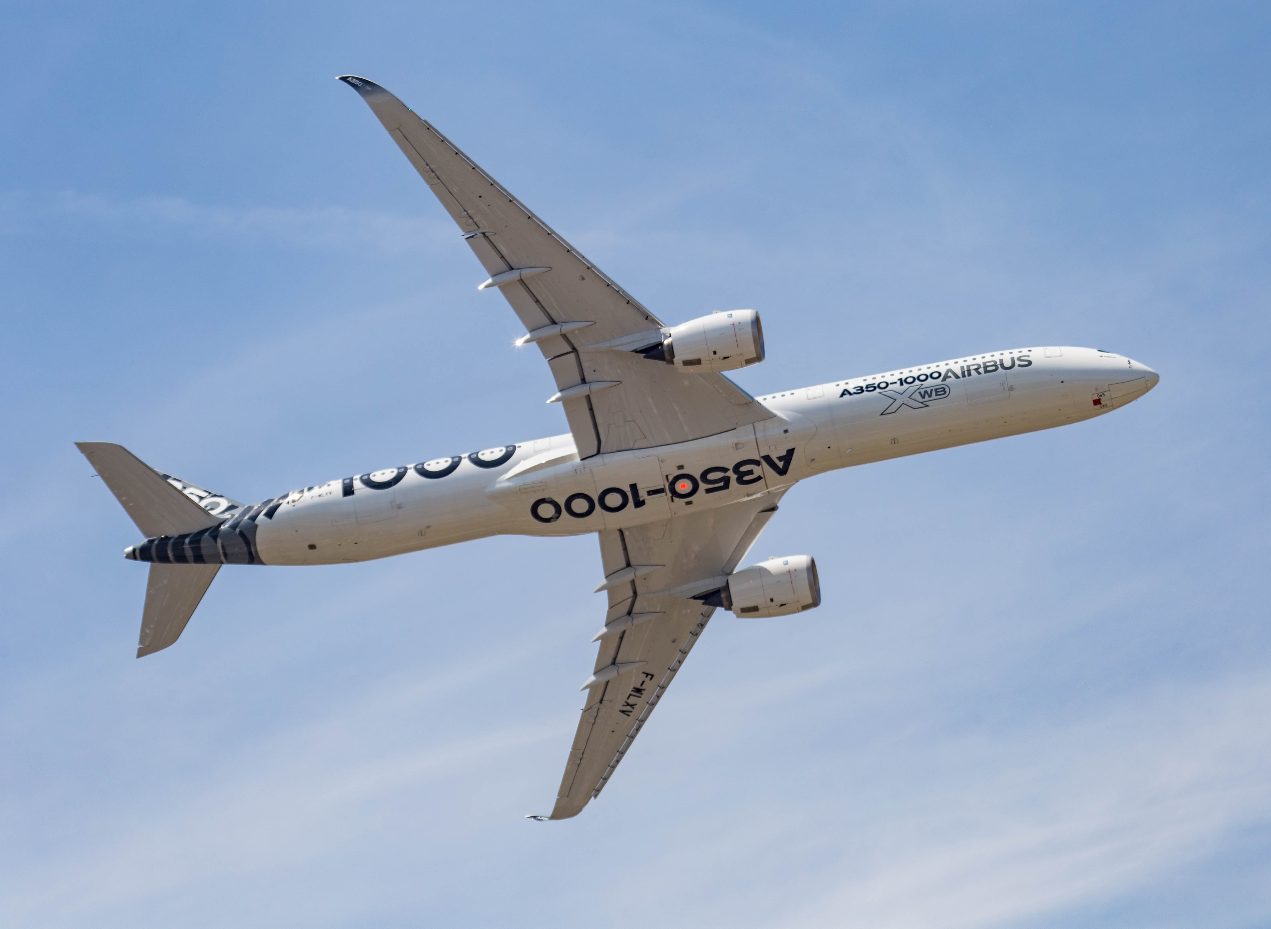 Airbus A350-1000